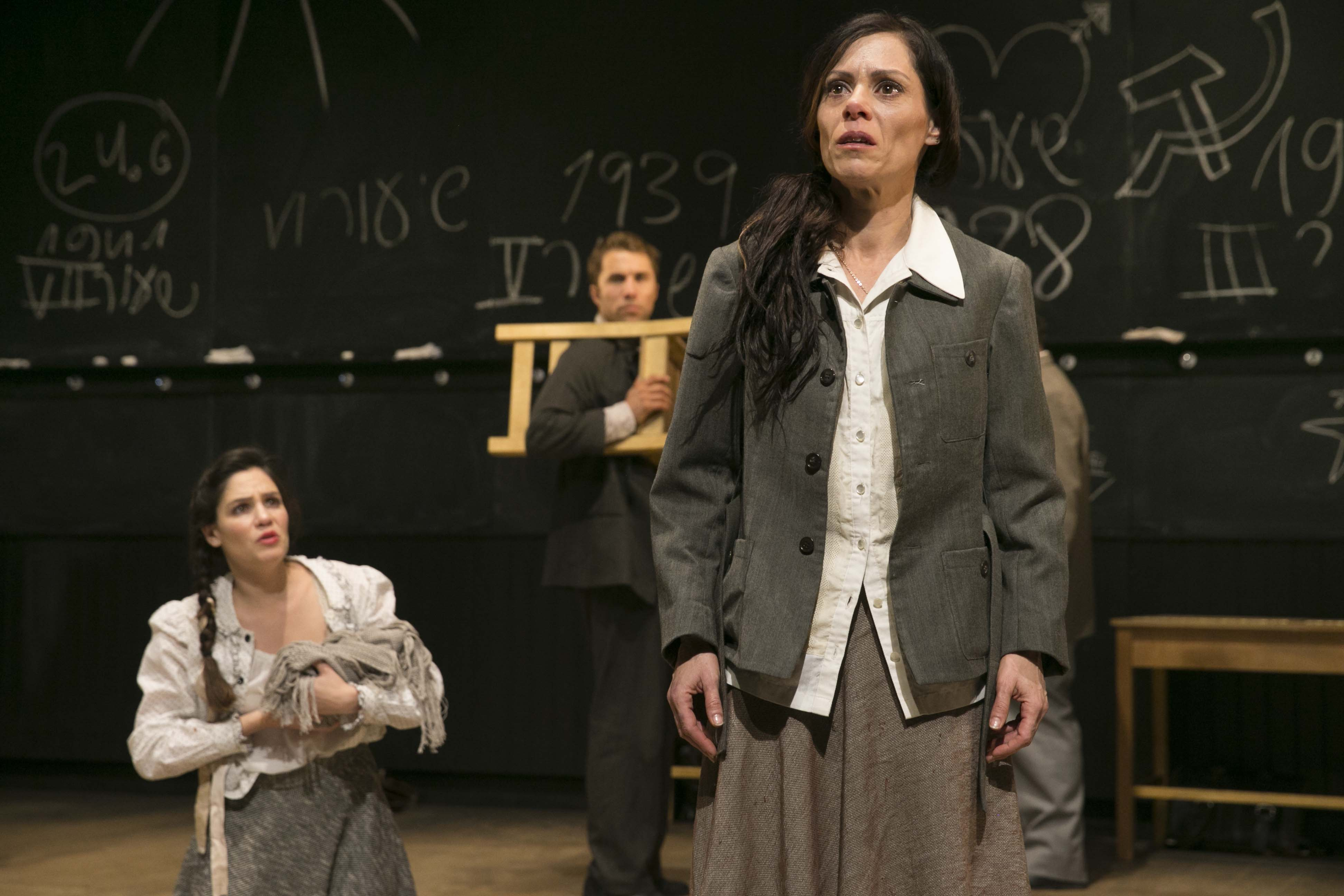 מיקי פלג-רוטשטיין בתפקיד זוחה בהצגה "הכתה שלנו"